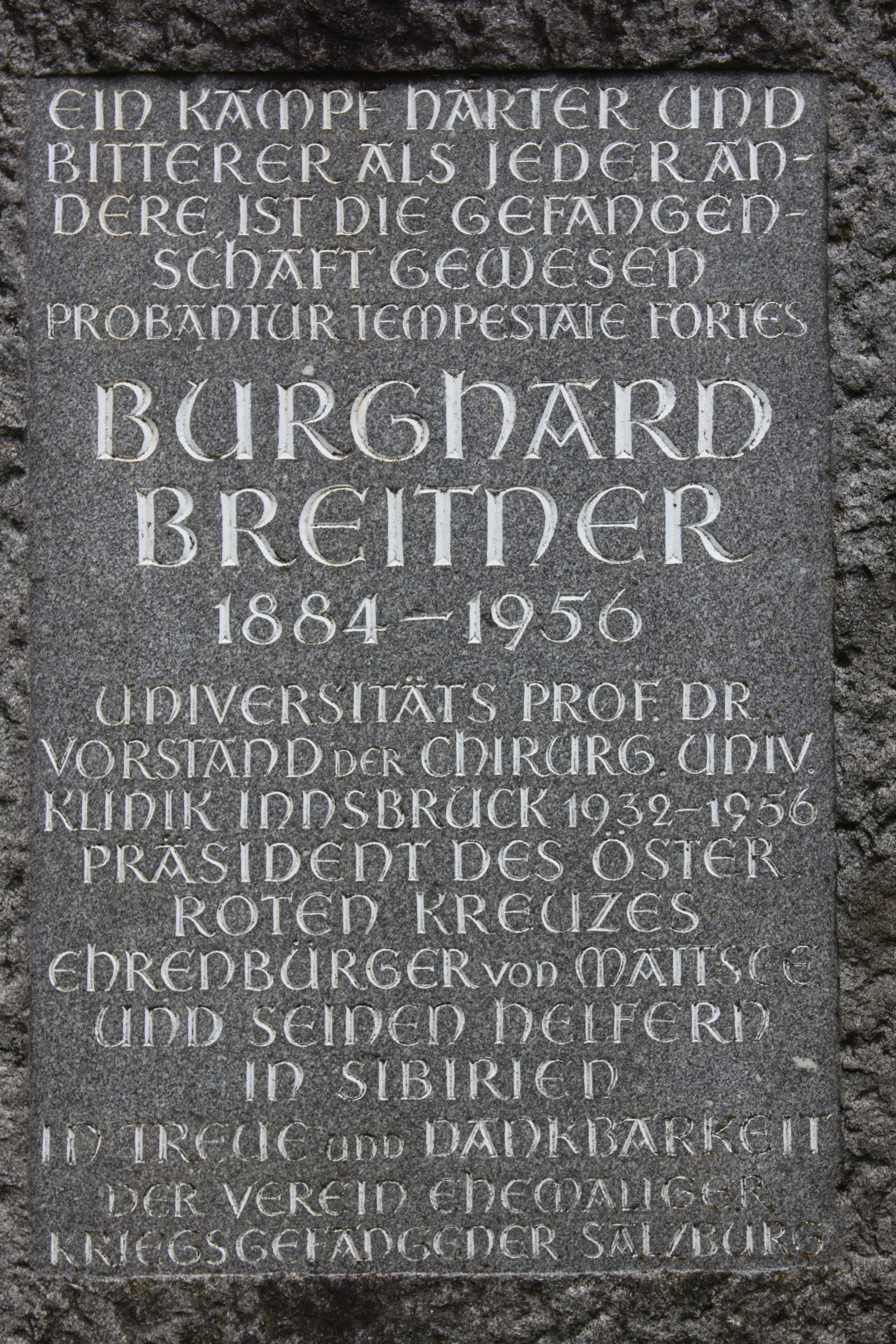 Denkmal zu Burghard Breitner in Mattsee